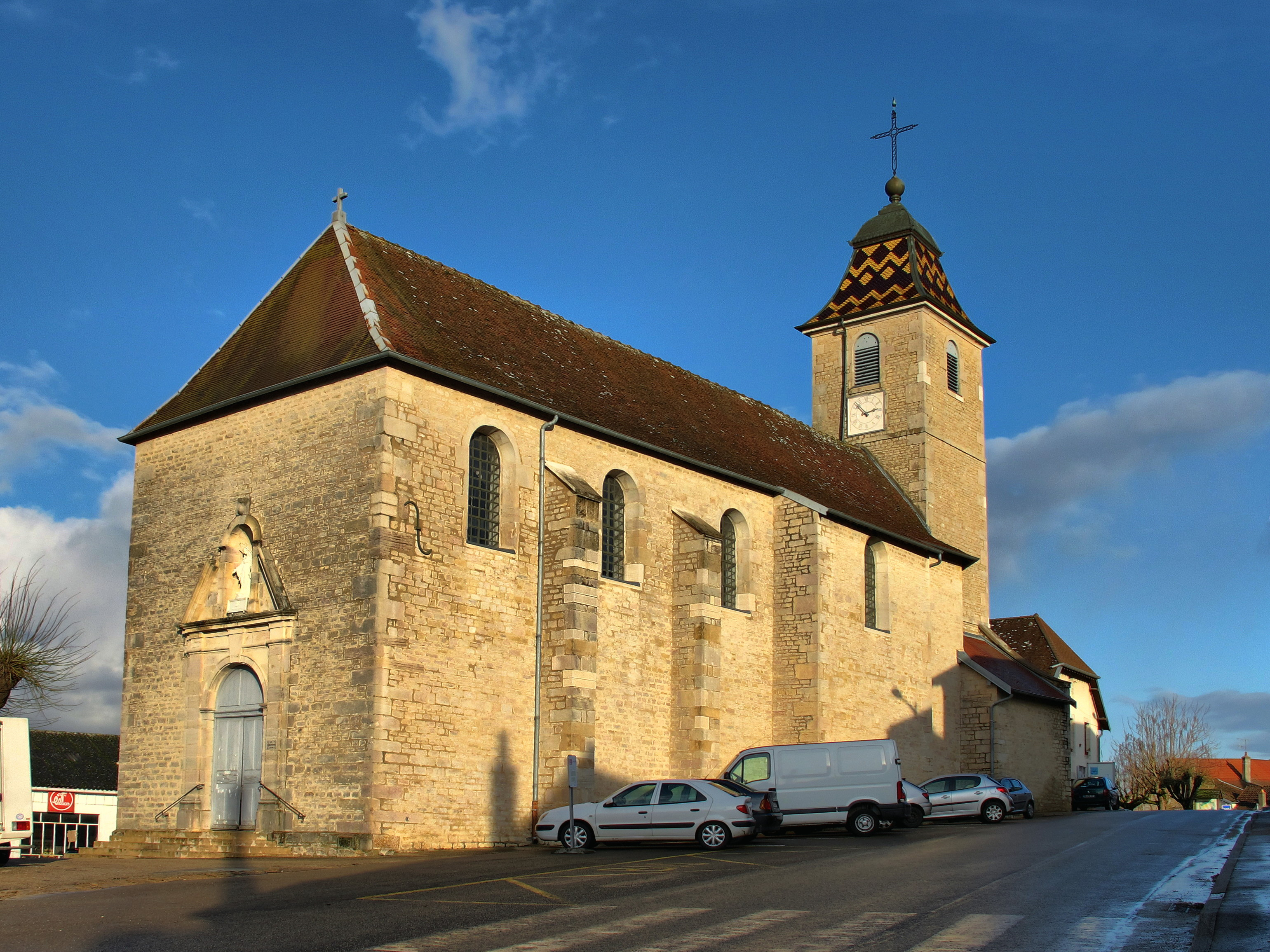 Inscrit aux monuments historiques sous le numéro : PA00101716